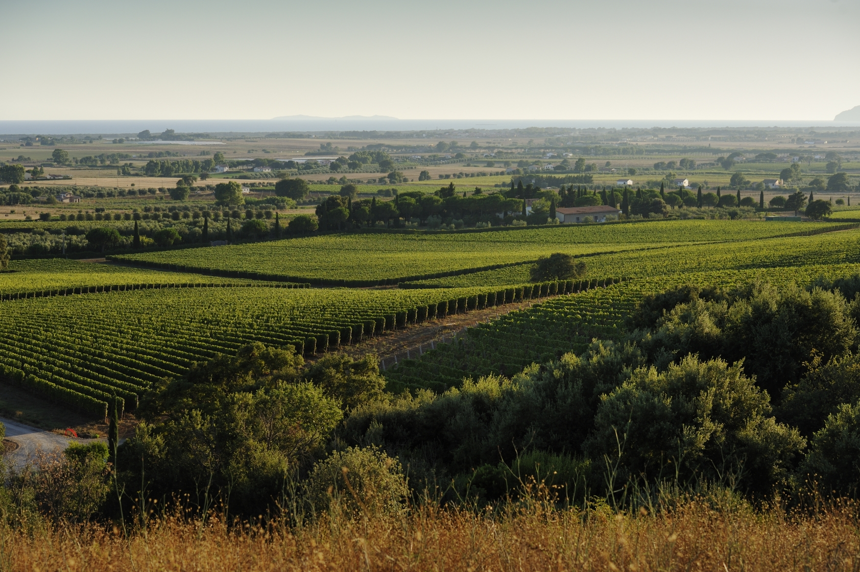 Weinberge für Monteverro Wein